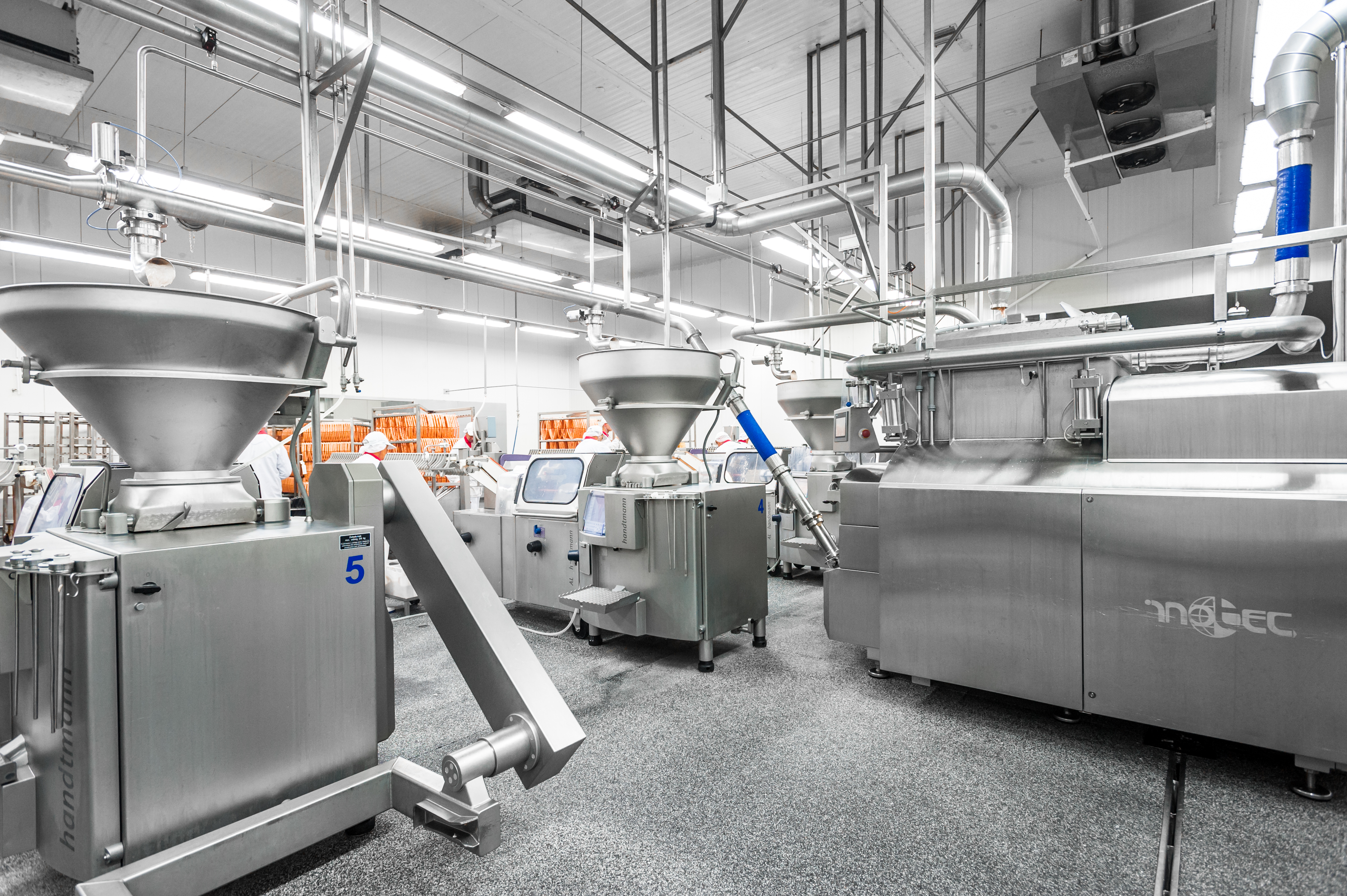 Sokołów SA - Czyżew, produkcja (2)